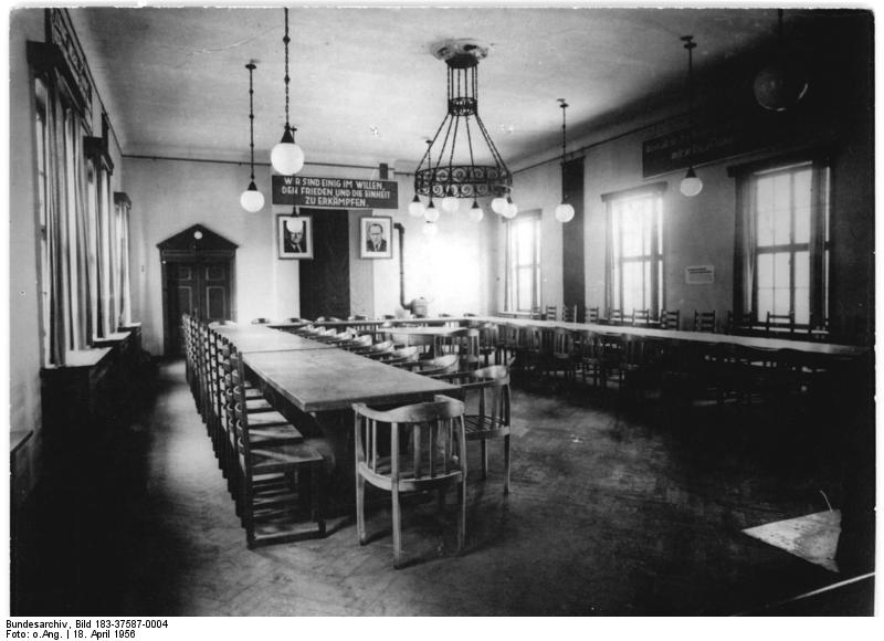 Gotha, Tivoli, Blick in den Saal Zentralbild TBD 18.4.1956 Wjt-Th. "Tivoli" in Gotha. Stätte des Gothaer Parteitages der SPD (Gothaer Programm) UBz: Blick in den Saal.